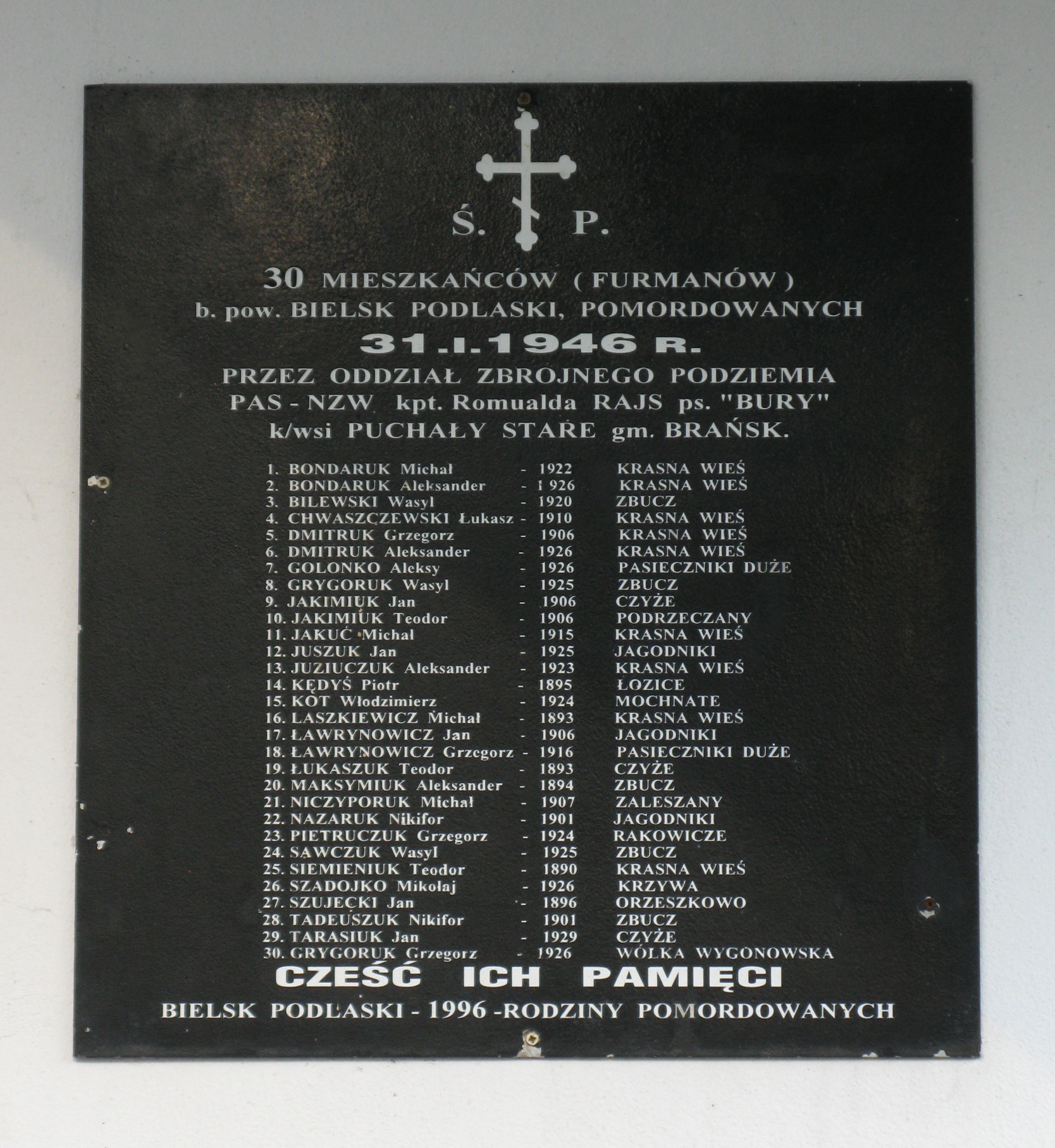 Cerkiew św. Michała Archanioła w Wólce Wygonowskiej. Tablica przy wejściu do cerkwi.